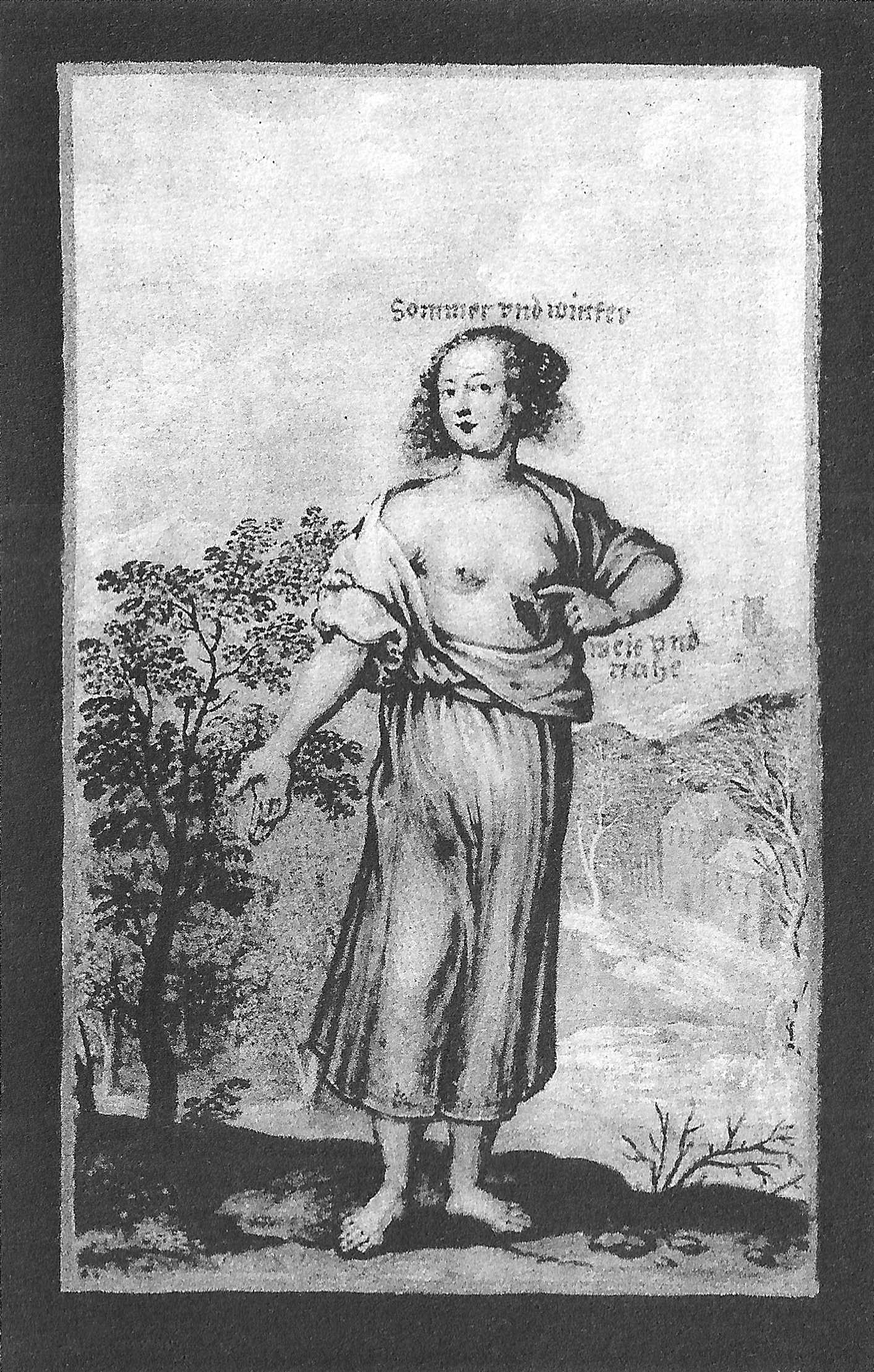 Anna Maria Markgräfin von Baden-Durlach (* 29.5.1617; † 17,10.1672; Miniatur)